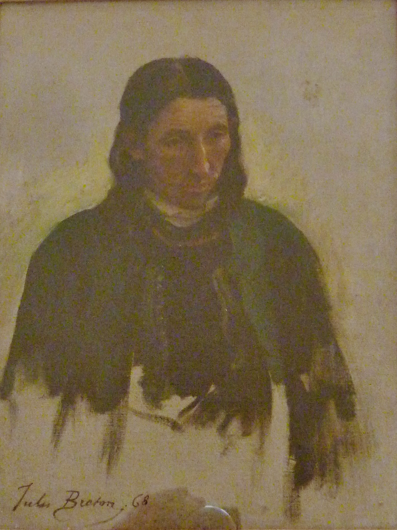 Le bedeau de Kerlaz